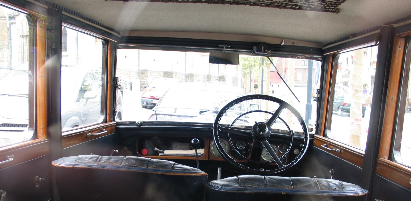 Interieur van de Austin 16 Berkeley (dashboard top-rail missing)